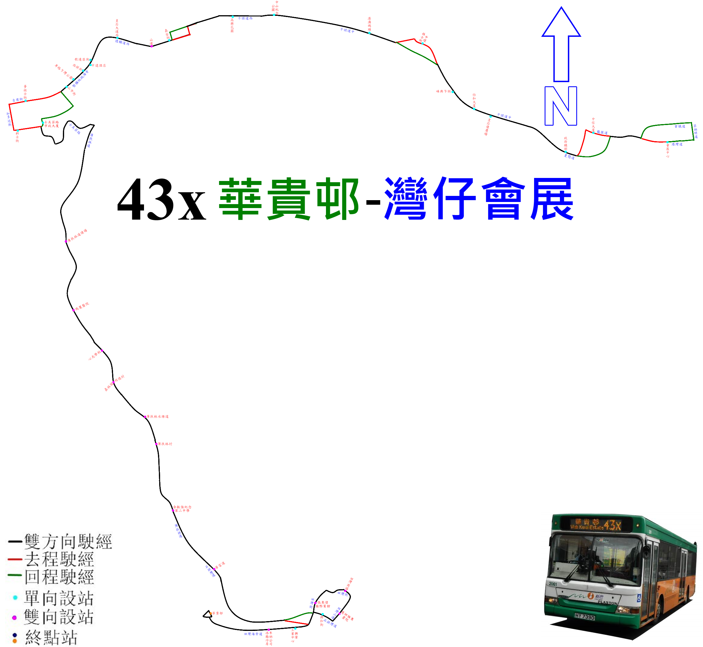 中文（香港）: 新巴43X線的走線圖